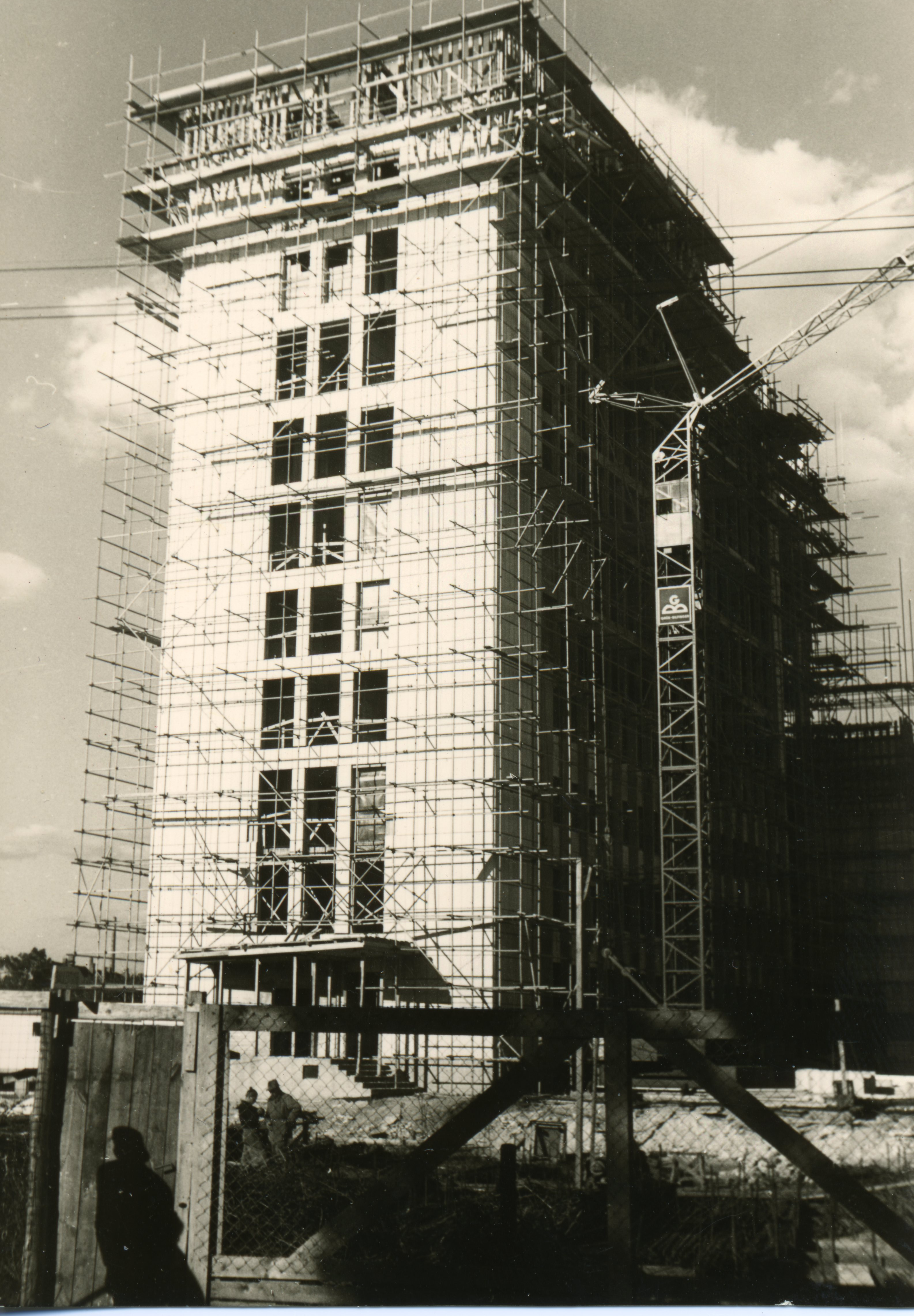 Architekturbüro Heinrich Wichmann, Celle. Mobil-Oil-Hochhaus in Bau, ca. 1957